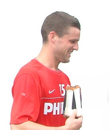 Jason Culina, PSV Eindhoven